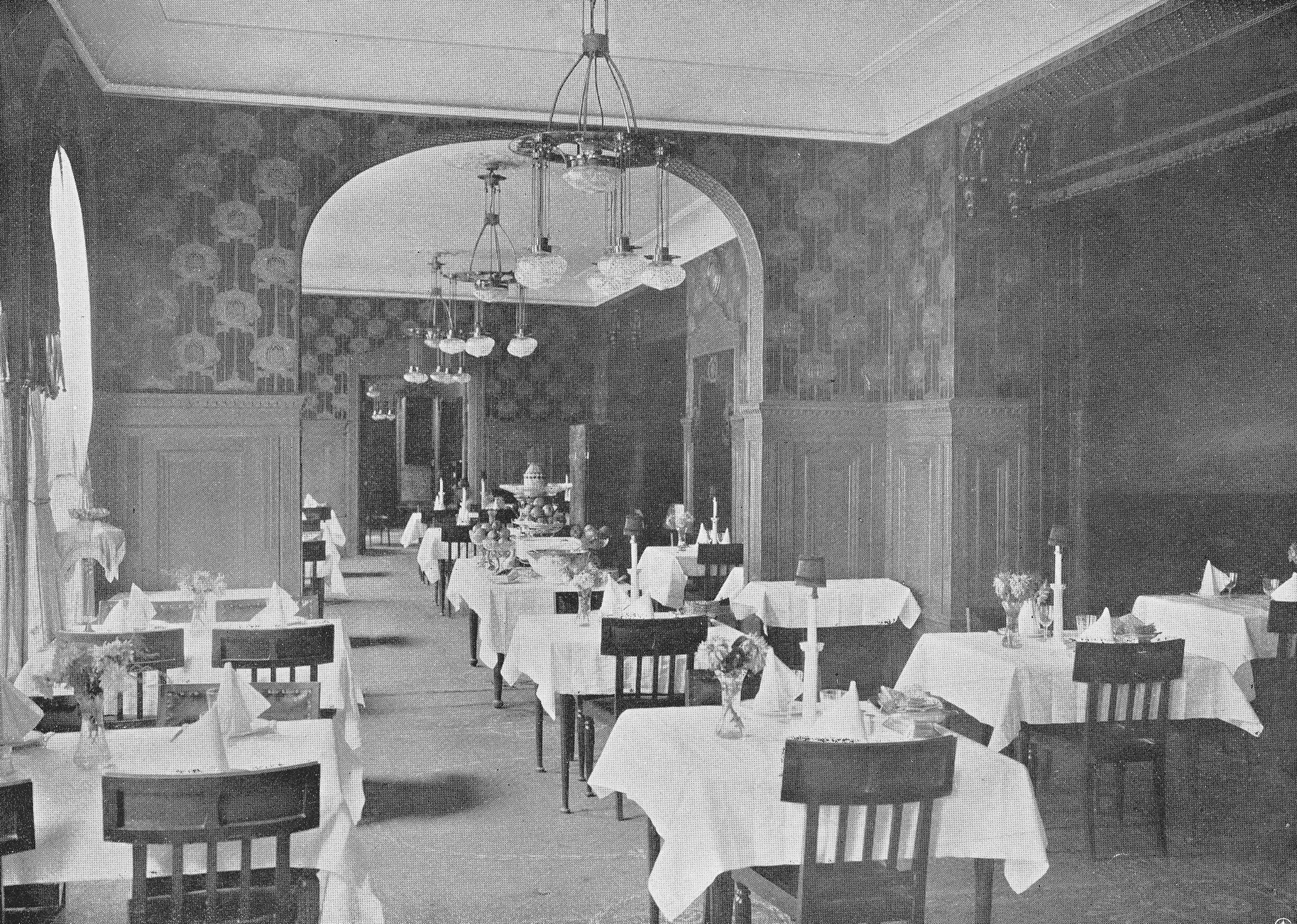 Drottninggatan 29, Hotel Kronprinsen, matsal